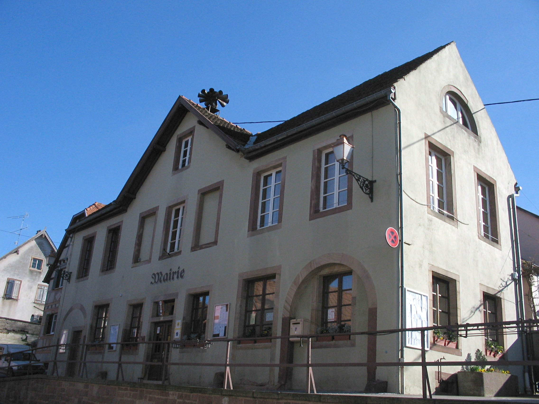 mairie de Scharrachbergheim (Bas-Rhin)